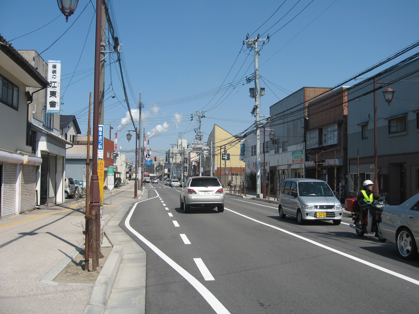 平日における万代町通の。